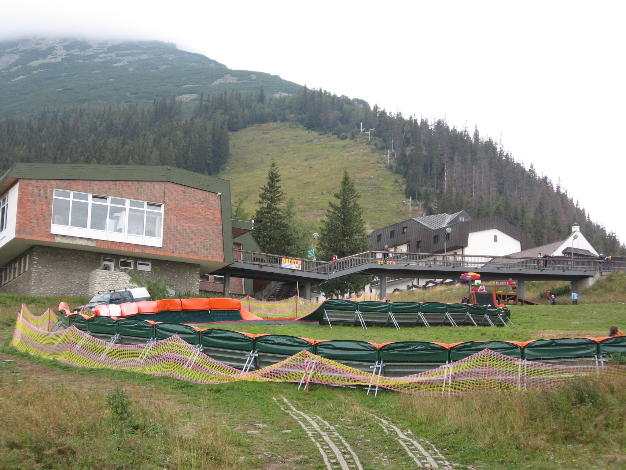 Vľavo vrcholová stanica pozemnej lanovej dráhy zo Starého Smokovca na Hrebienok, vpravo horský hotel Hrebienok